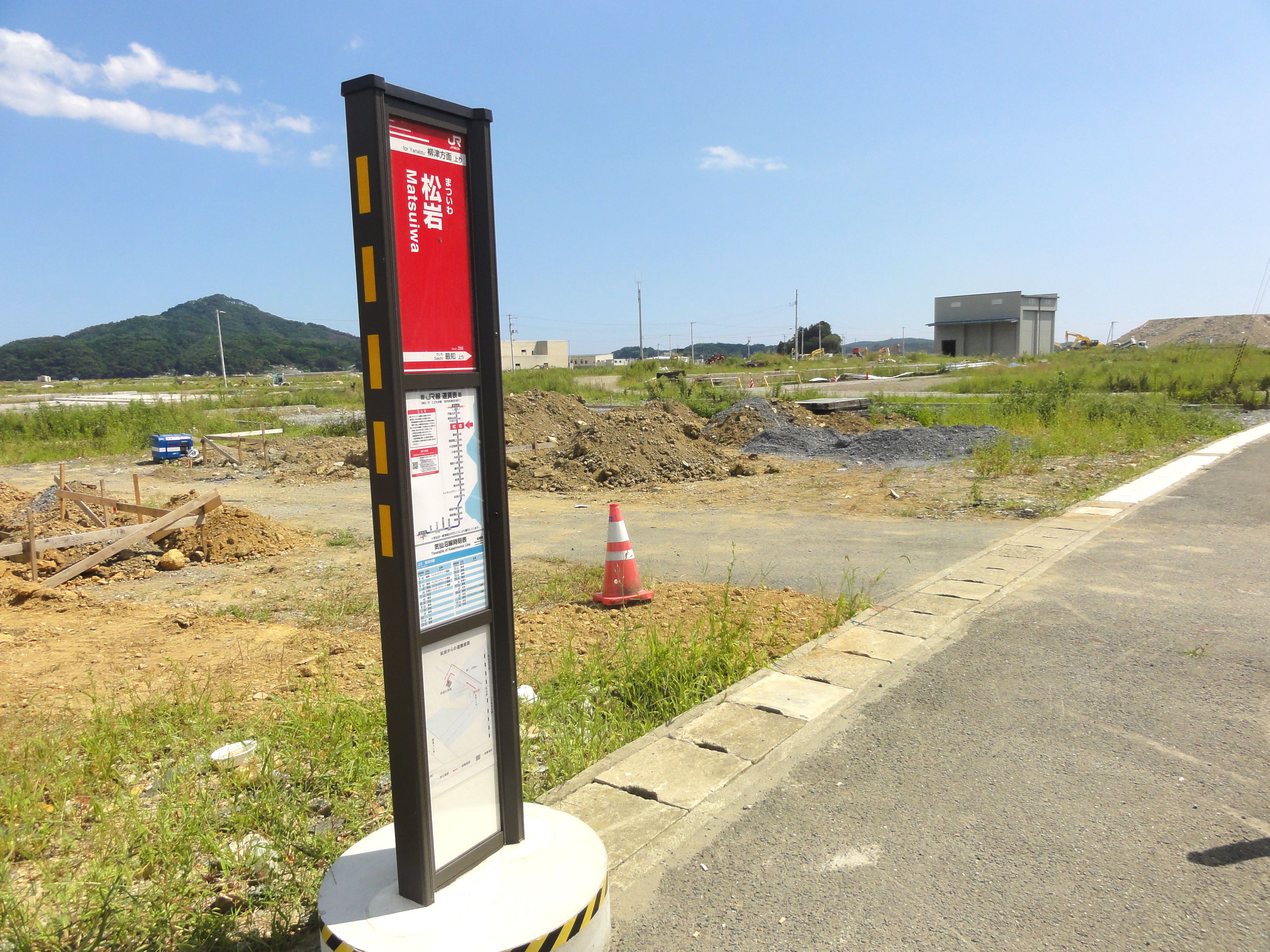 松岩駅 代行バス・バス停